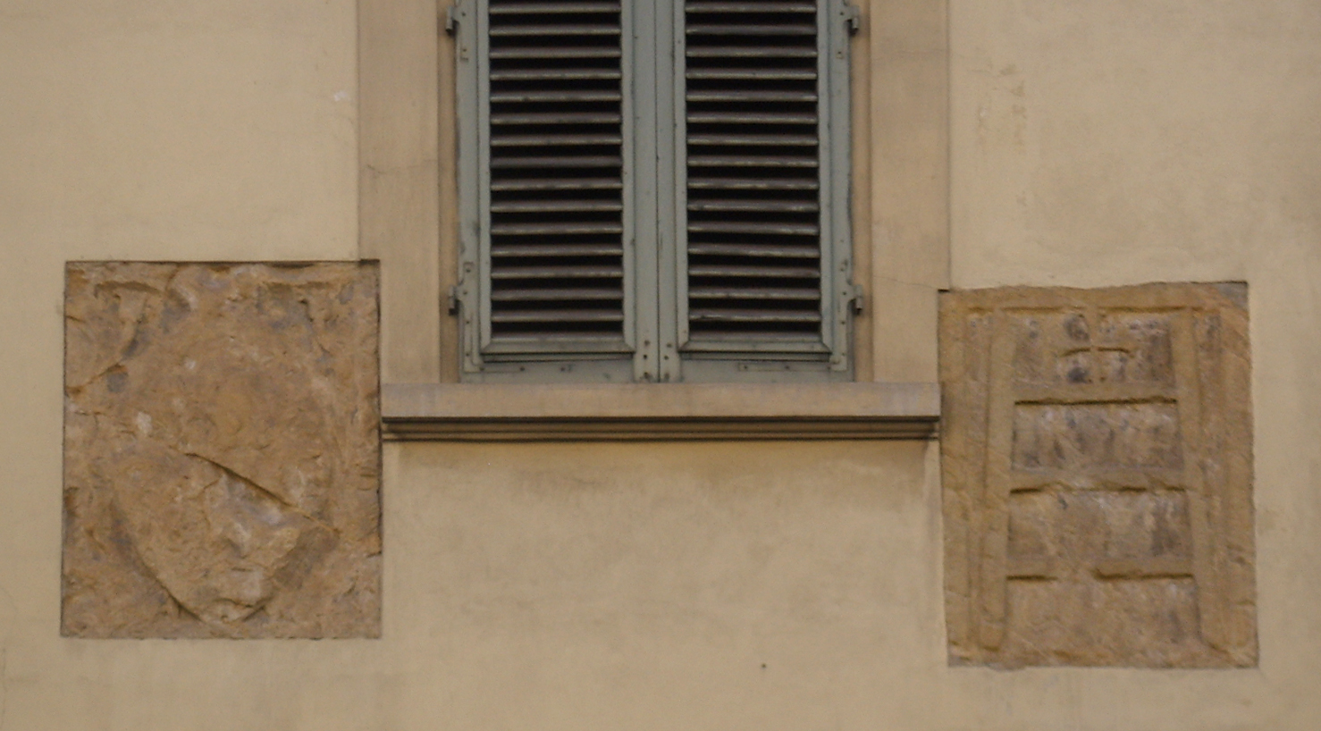 Stemma_spedale_della_scala